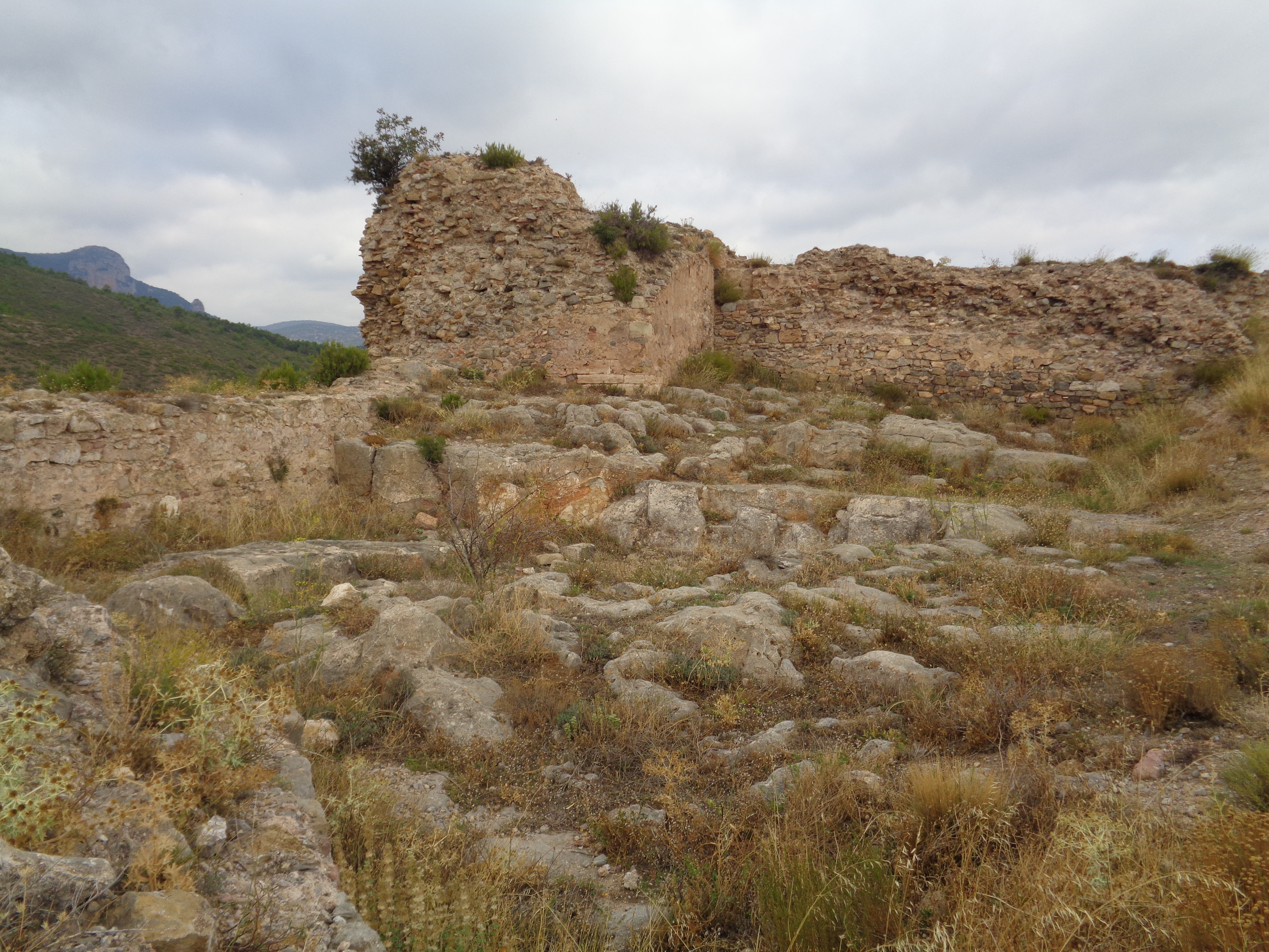 Begís. 07.022-005.